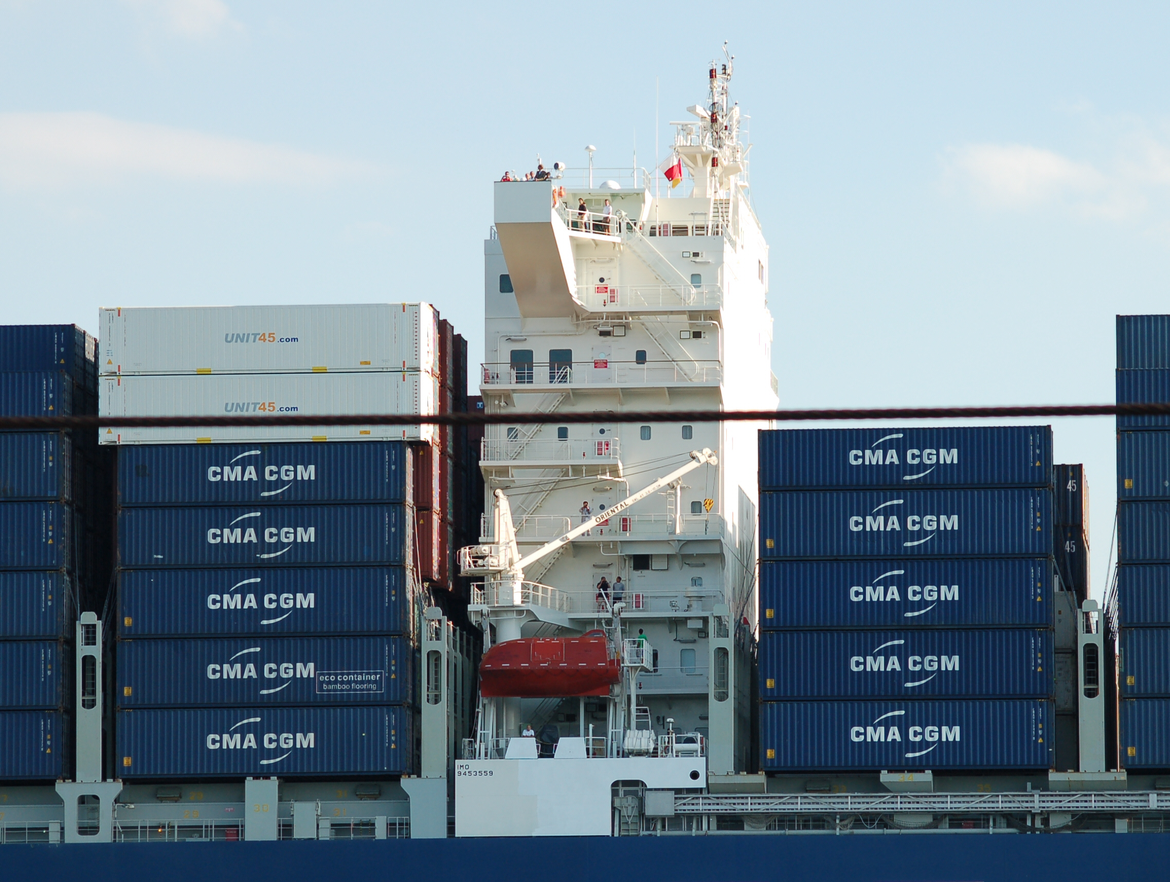 Die Kommandobrücke des Containerschiff CMA CGM Christophe Colomb auf der Elbe bei Wedel. IMO-Nummer: 9453559 MMSI-Nummer: 228315600 Rufzeichen: FNUY Länge: 365.0m Breite: 52.0m Flagge: Frankreich